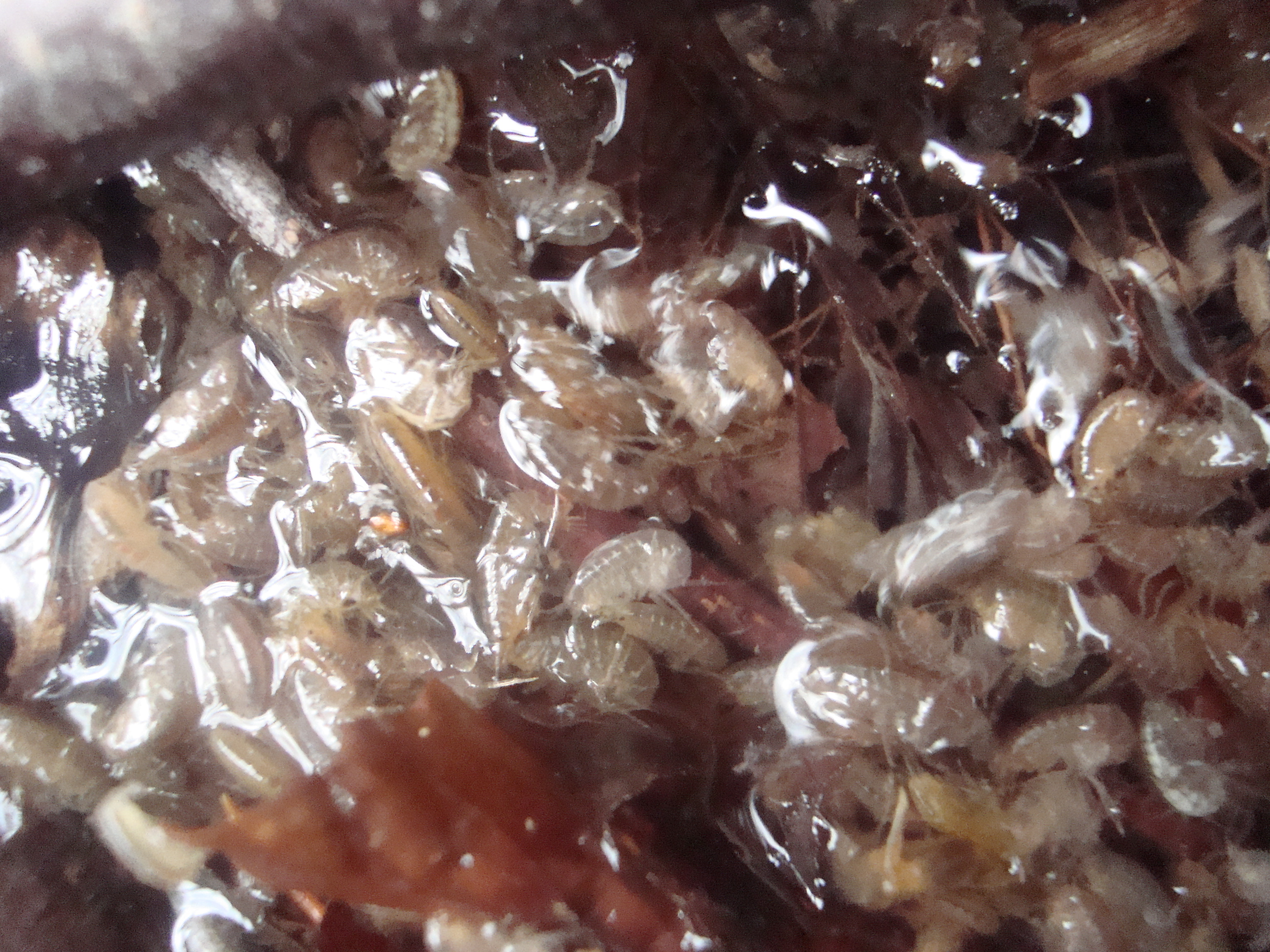 Drobní korýši v prameništi. Foto Podkomorské lesy, Česká republika, jižní Morava